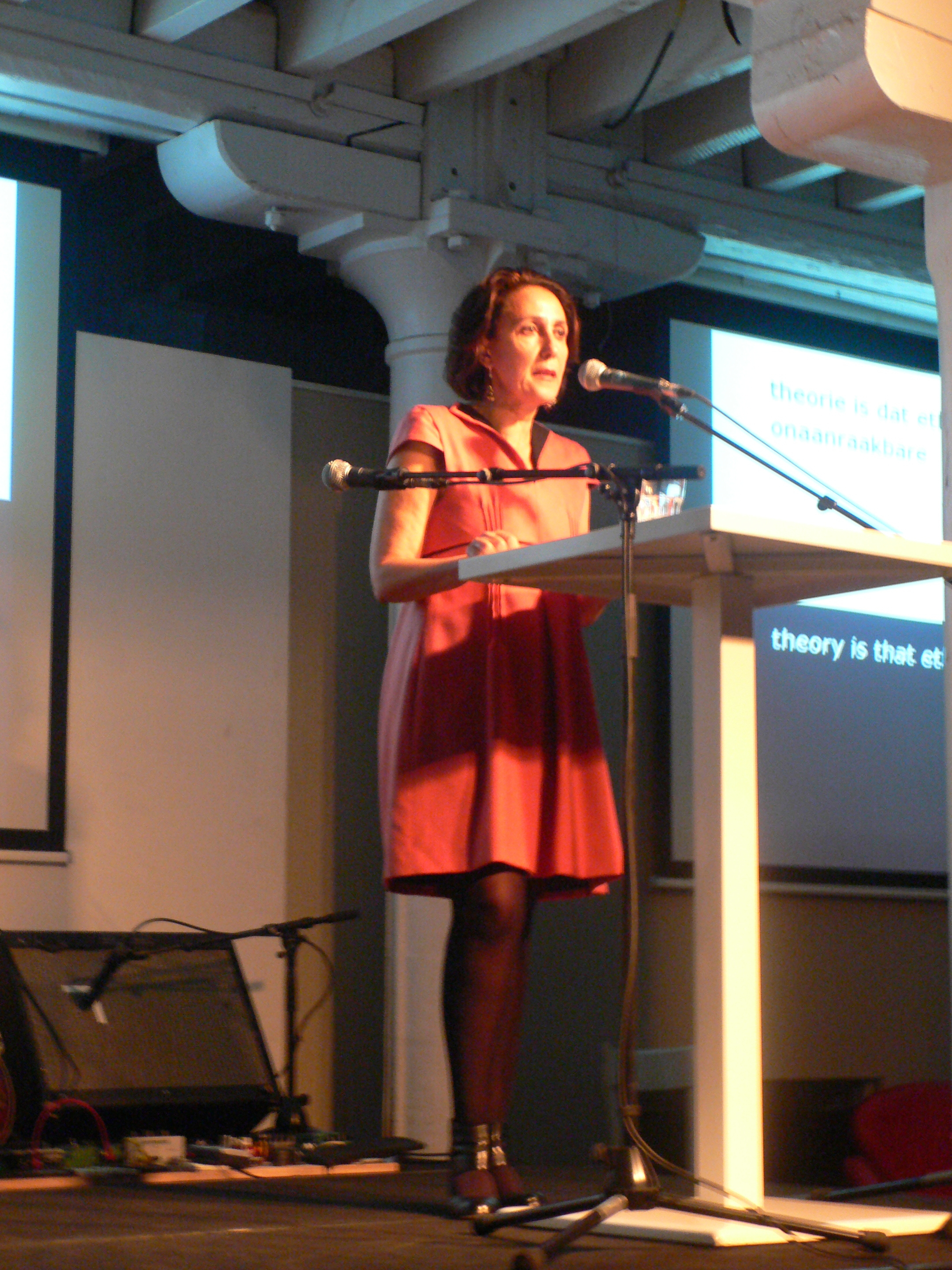 Chus Pato no Antwerp poetry festival, 2012